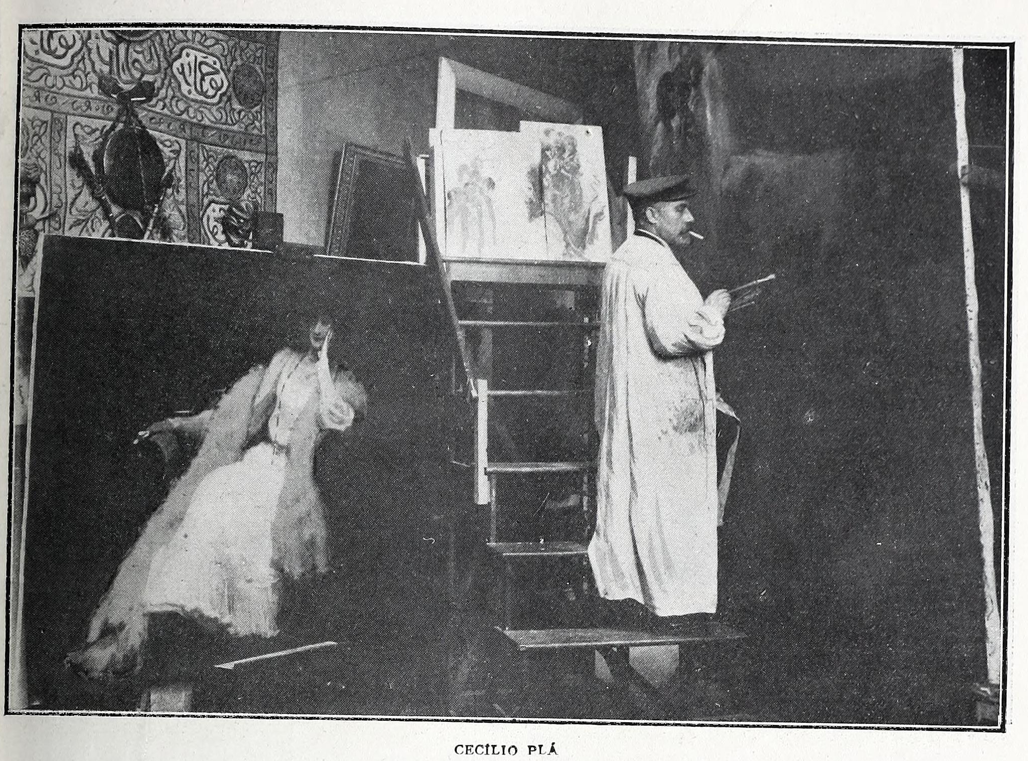 Cecilio Pla.